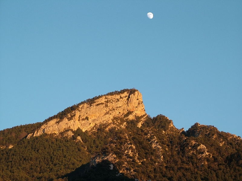 El sobrepuny des de la Nou de Berguedà